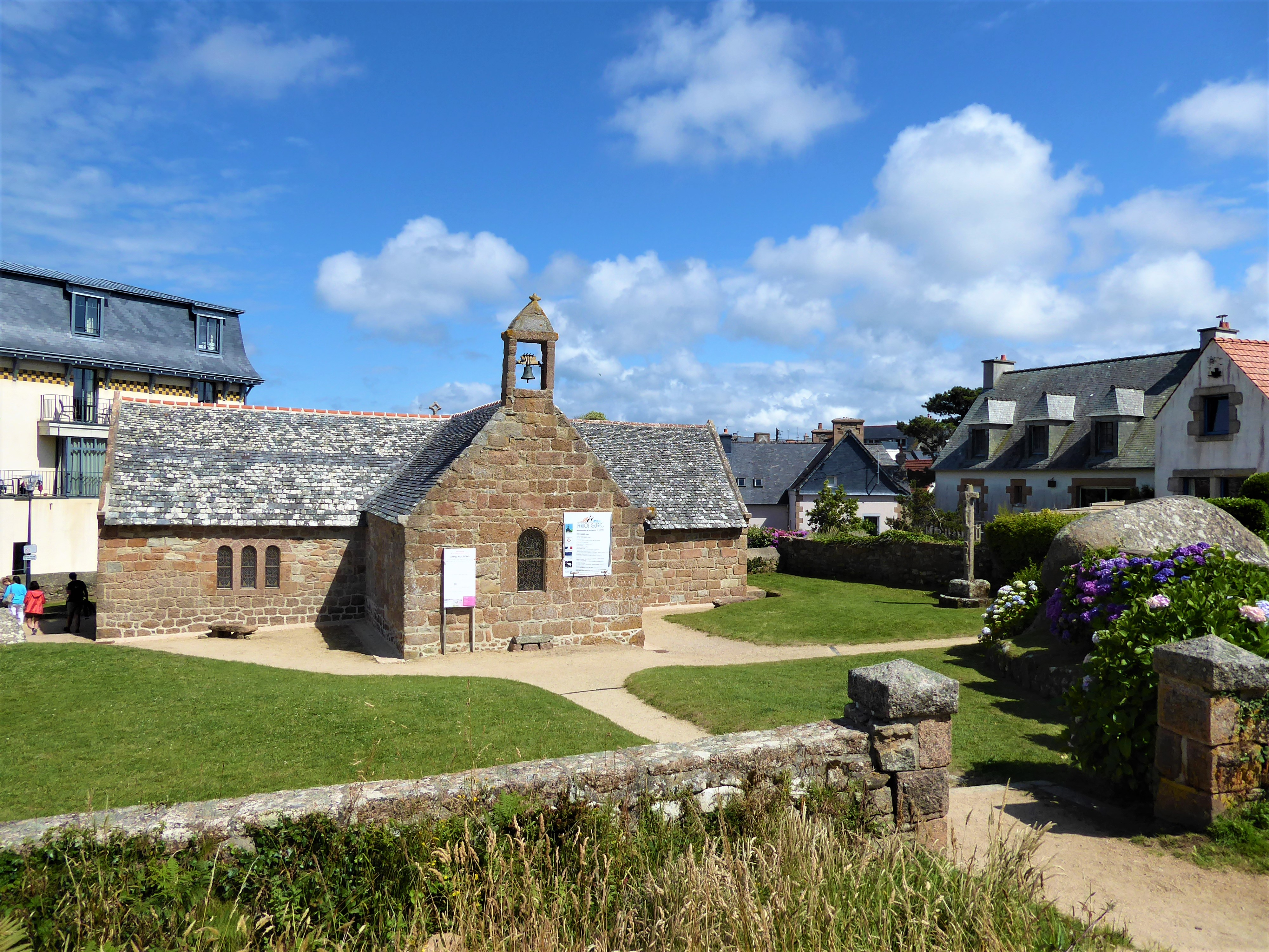 Chapelle Saint-Guirec de Ploumanac'h